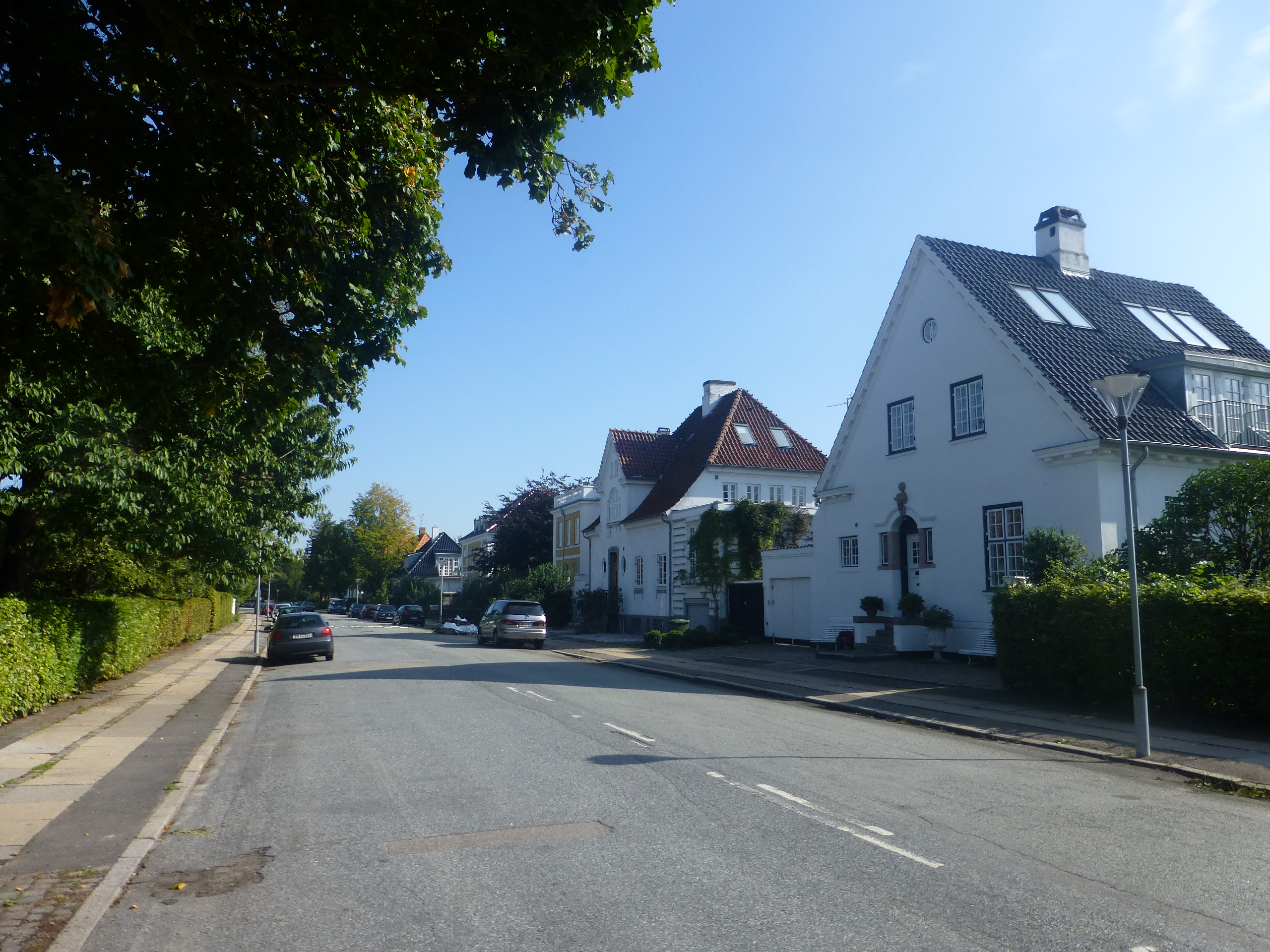 The street Norgesmindevej in Hellerup in Copenhagen.